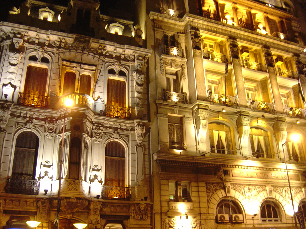 Noche en Montevideo. Palacio Uriarte de Heber (Museo del Gaucho y Museo de la Moneda) y Palacio Brasil.Montevideo, Uruguay